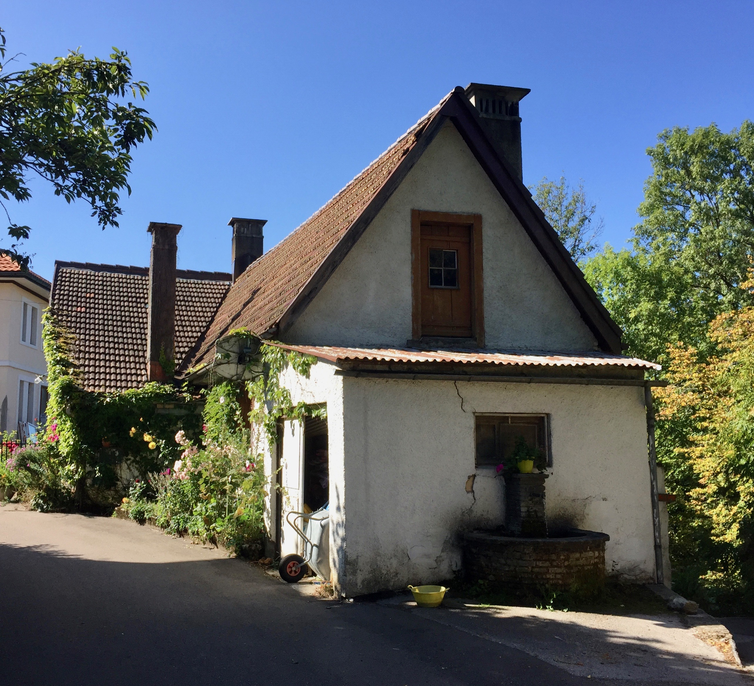 Haus des Optikers Pierre-Louis Guinand (1748–1824) in Les Brenets (Kanton Neuenburg). Guinand erfand das Rührverfahren zur Homogenisierung von Flintglas für achromatische Objektive. Er richtete im Auftrag Joseph Utzschneiders ab 1805 die Glashütte in Benediktbeuern ein und unterrichtete dort ab 1809 Joseph Fraunhofer in der Herstellung von optischem Glas. 1814 kehrte er nach Les Brenets zurück. Seine Angehörigen und Nachfolger beherrschten lange Zeit den Weltmarkt für optisches Glas.